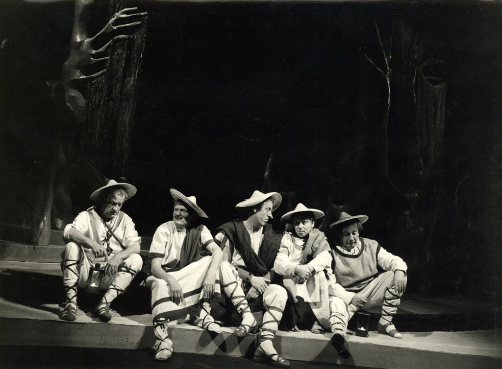 William Shakespeare, Sen kresne noči, Drama SNG v Ljubljani. Na fotografiji: Stane Potokar (Dunja), Stane Sever (Klobčič), Aleksander Valič (Nosan), Drago Makuc (Pisk), France Presetnik (Smuk).